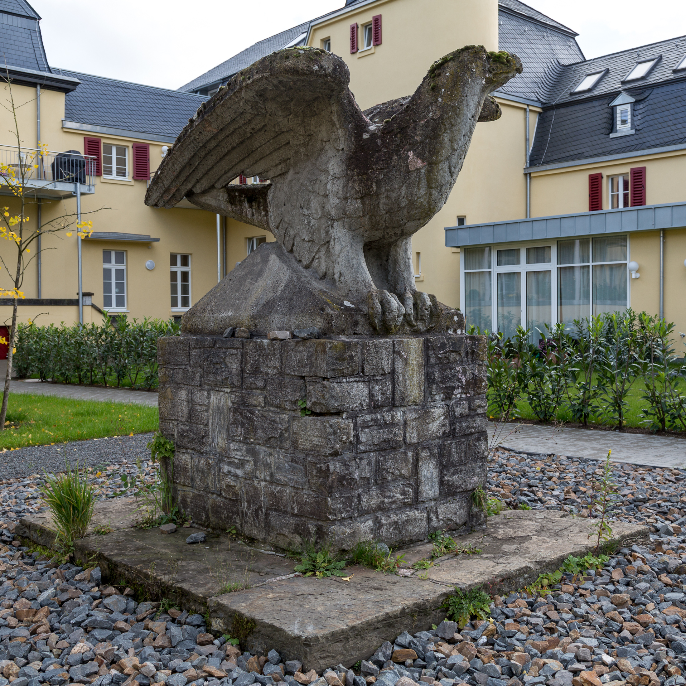 Rösrath, Denkmalnummer 23, Venauen (Haus Venauen) nach der Renovierung